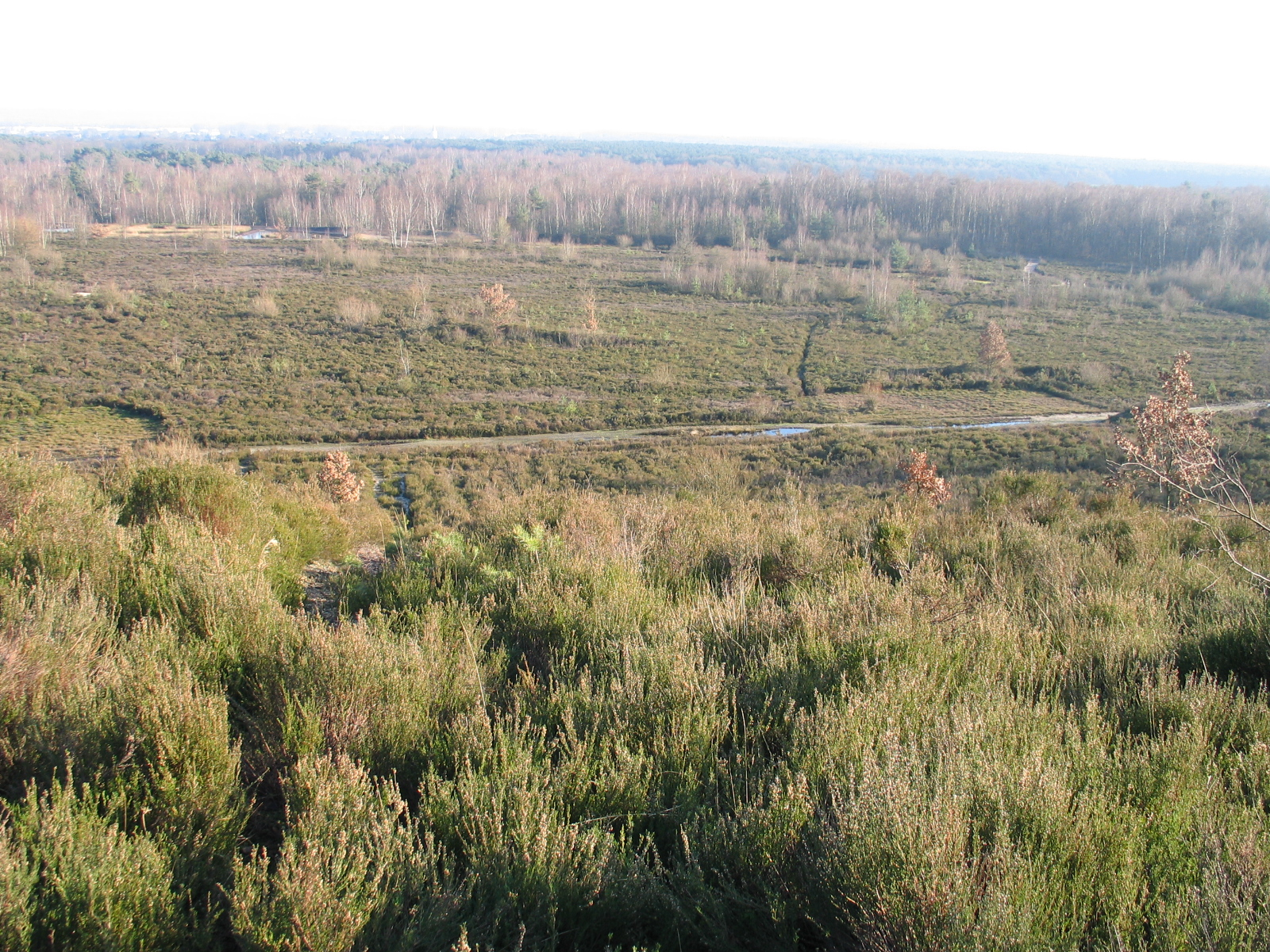 Nationaal Park Hoge Kempen Belgium - my own work Paul Hermans